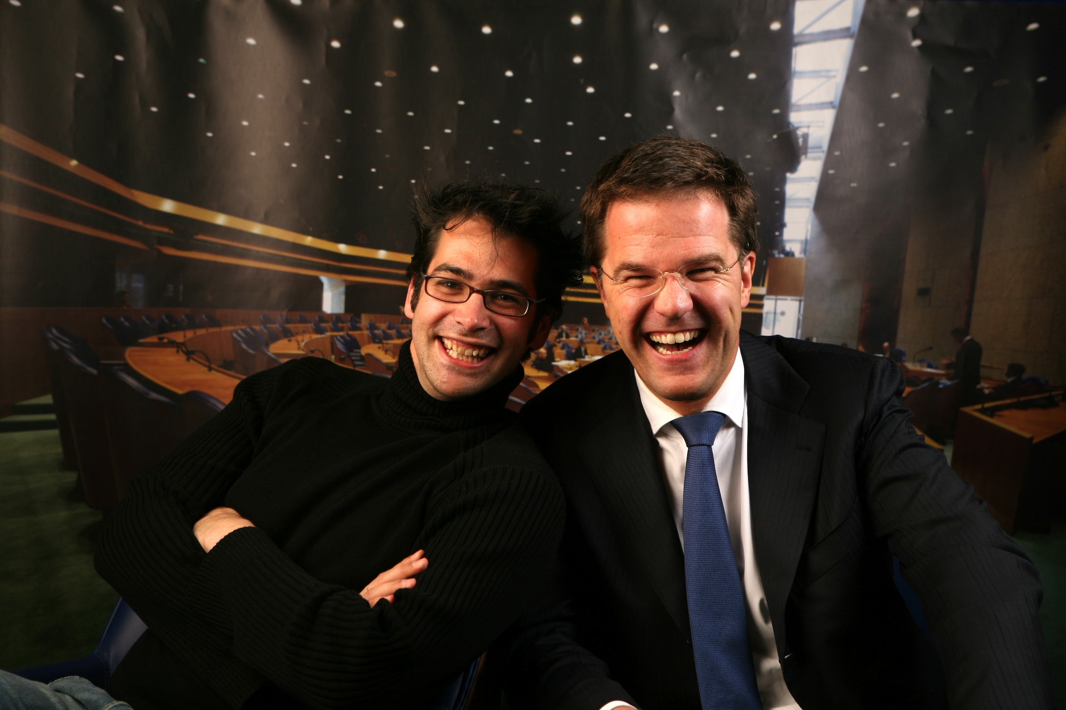 "Op de foto met..." was één van de programma onderdelen van de VVD nieuwe ledendag. De VVD had me ingehuurd om de nieuwe leden te portretteren met Mark Rutte, Laetitia Griffith, Johan Remkes, Henk Kamp, Brigitte van den Burg of Fred Teeven. Dit is een snapshot tussendoor met Mark.